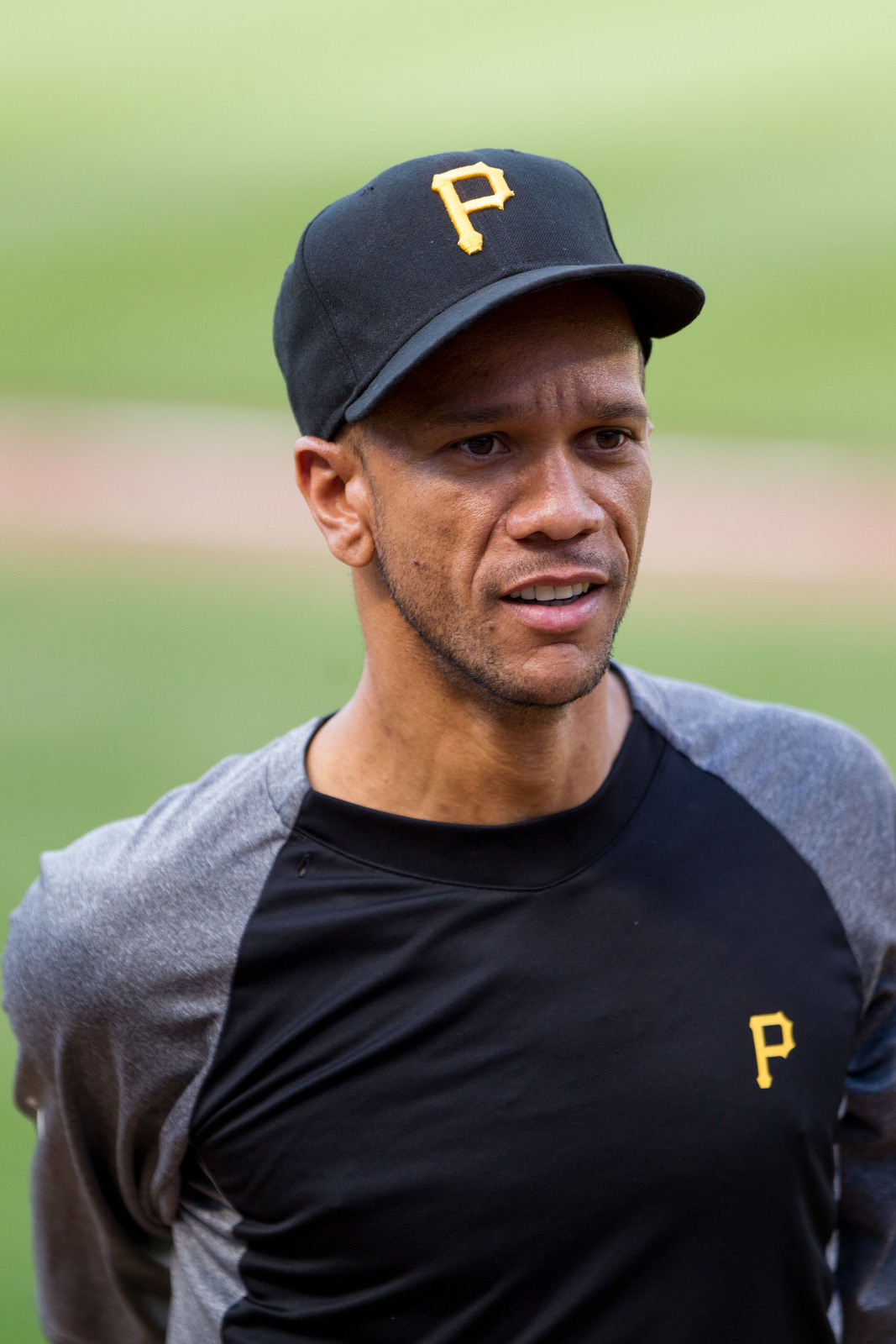 Juan Cruz